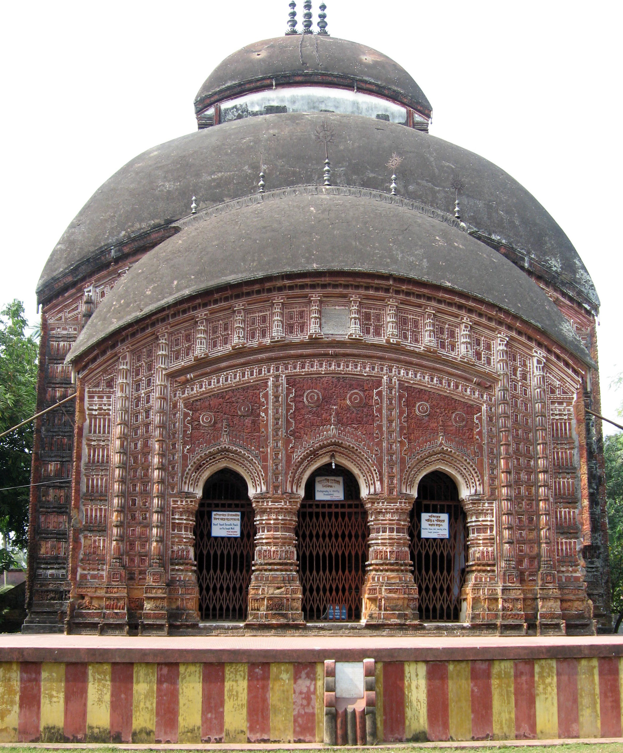 Antpur Radhagovindjiu temple is situated at Antpur in Hooghly District of West Bengal India. The construction of the temple was completed in 1786 AD. আঁটপুরের বিখ্যাত রাধাগোবিন্দজিউ এর মন্দির তৈরি সম্পূর্ণ হয় ১৭৮৬ খ্রীষ্টাব্দে । (১৭০৮ শকাব্দ)। এই মন্দিরটি তৈরি করেছিলেন বর্ধমান রাজের দেওয়ান কৃষ্ণরাম মিত্র । মন্দিরের গায়ে বিভিন্ন পুরান রামায়ন মহাভারত ও বিভিন্ন ঐতিহাসিক ঘটনা টেরাকোটার অনন্যসাধারন শিল্পের মাধ্যমে দেখানো আছে ।